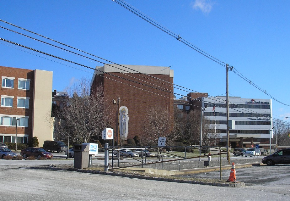 Saint Clare's Hospital, Denville's largest employer.